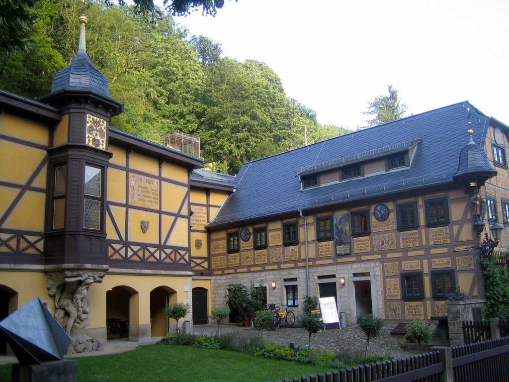 Leonhardi-Museum. Emil August Eduard Leonhardi (* 19. Januar 1828 in Freiberg; † 15. Juli 1905 in Dresden-Loschwitz) war ein deutscher Landschaftsmaler und Sohn des schnell zu Wohlstand gekommenen Dresdner Tintenfabrikanten August Leonhardi (1805–1865). Er erwarb 1879 die ausgediente, ehemaligen Hentschelmühle („Rothe Amsel“) im Dresdner Stadtteil Loschwitz und baute sie u.a. zu einem Atelier um. Dresden